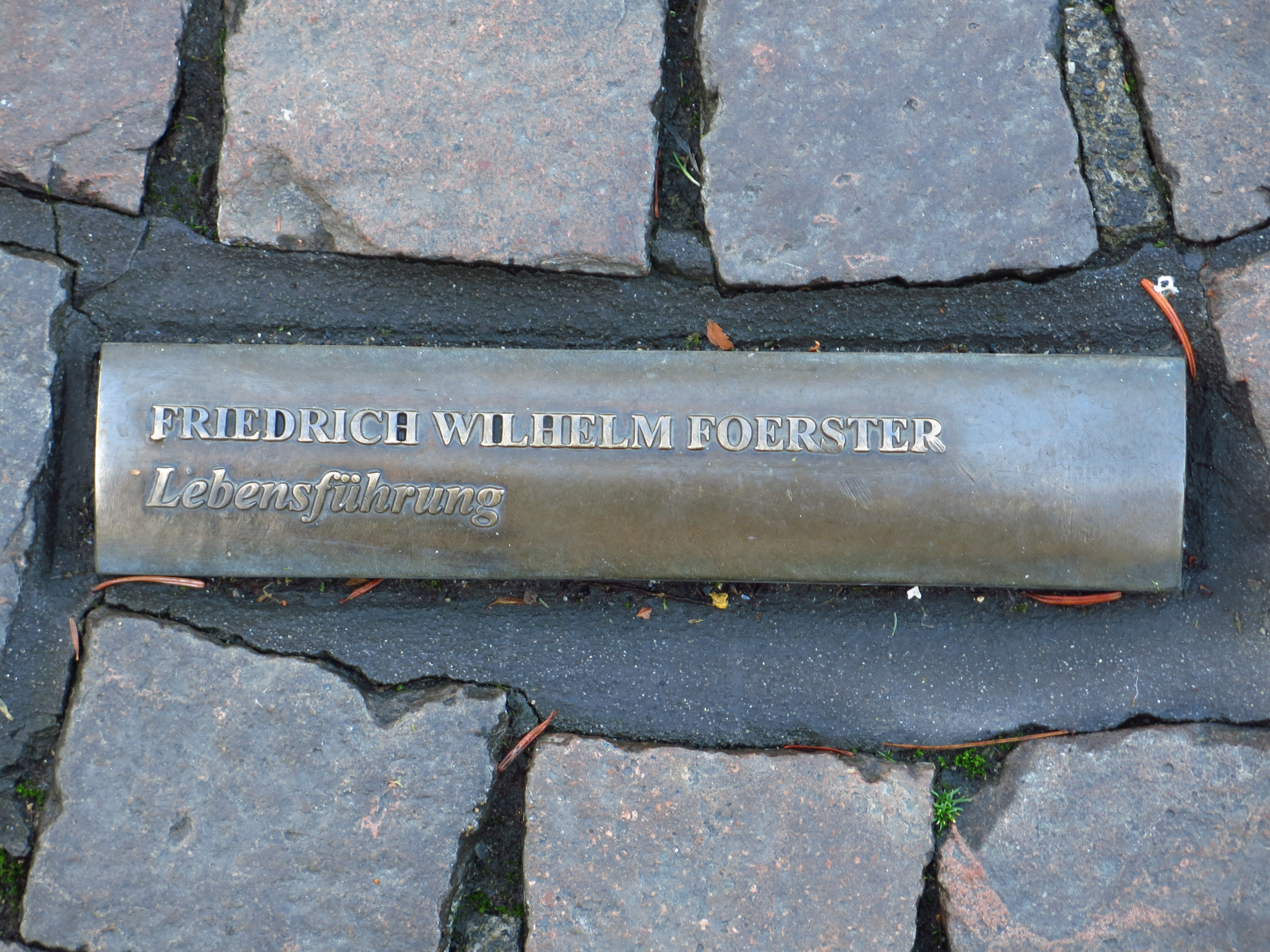 Das Mahnmal zur Bücherverbrennung auf dem Bonner Markt; In das Pflaster des Bonner Markt sind insgesamt 60 sichtbare Buchrücken, sogenannte „Lesezeichen“, verteilt, die sich an der Rathaustreppe, dem Ort an dem die Bücher am 10. Mai 1933 verbrannt wurden, verdichten. Zusätzlich wurde ein wetterfester Archiv-Behälter in Form einer Büchertruhe in den Platz eingelassen. Seine Inschrift benennt das Ereignis und weitere Autoren von verbrannten Büchern.